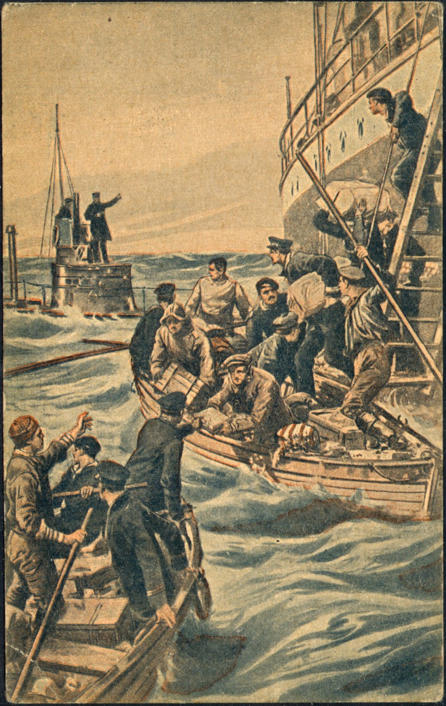 Почтовая открытка "Перед потоплением пассажирского парохода германской подводной лодкой", изданная Никольской общиной Российского общества Красного Креста.